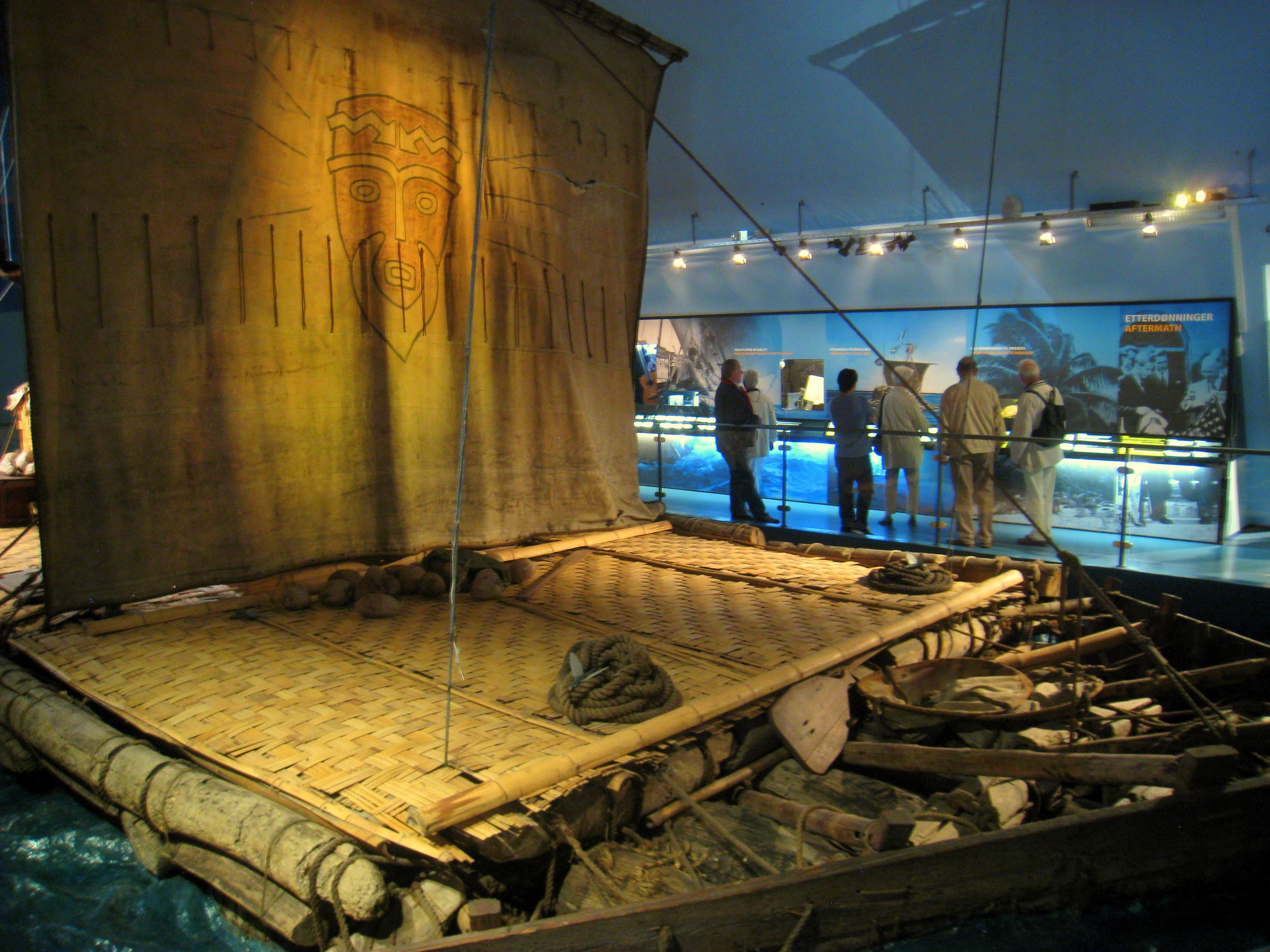 Kon-Tiki raft, in Kon-Tiki Museum, Oslo, Norway.